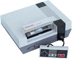 NES